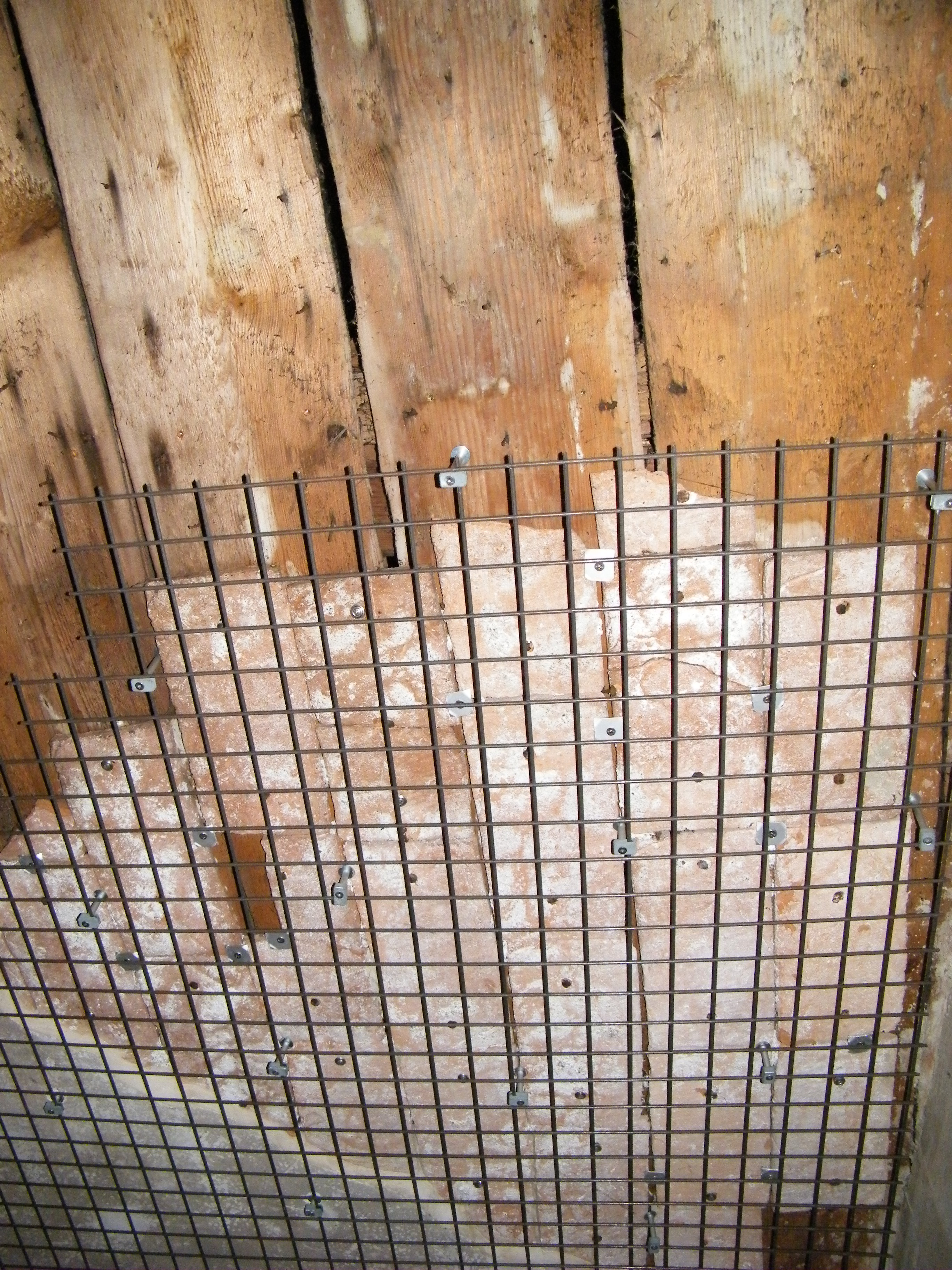 Brandschutz im Nonnenturm Kempten